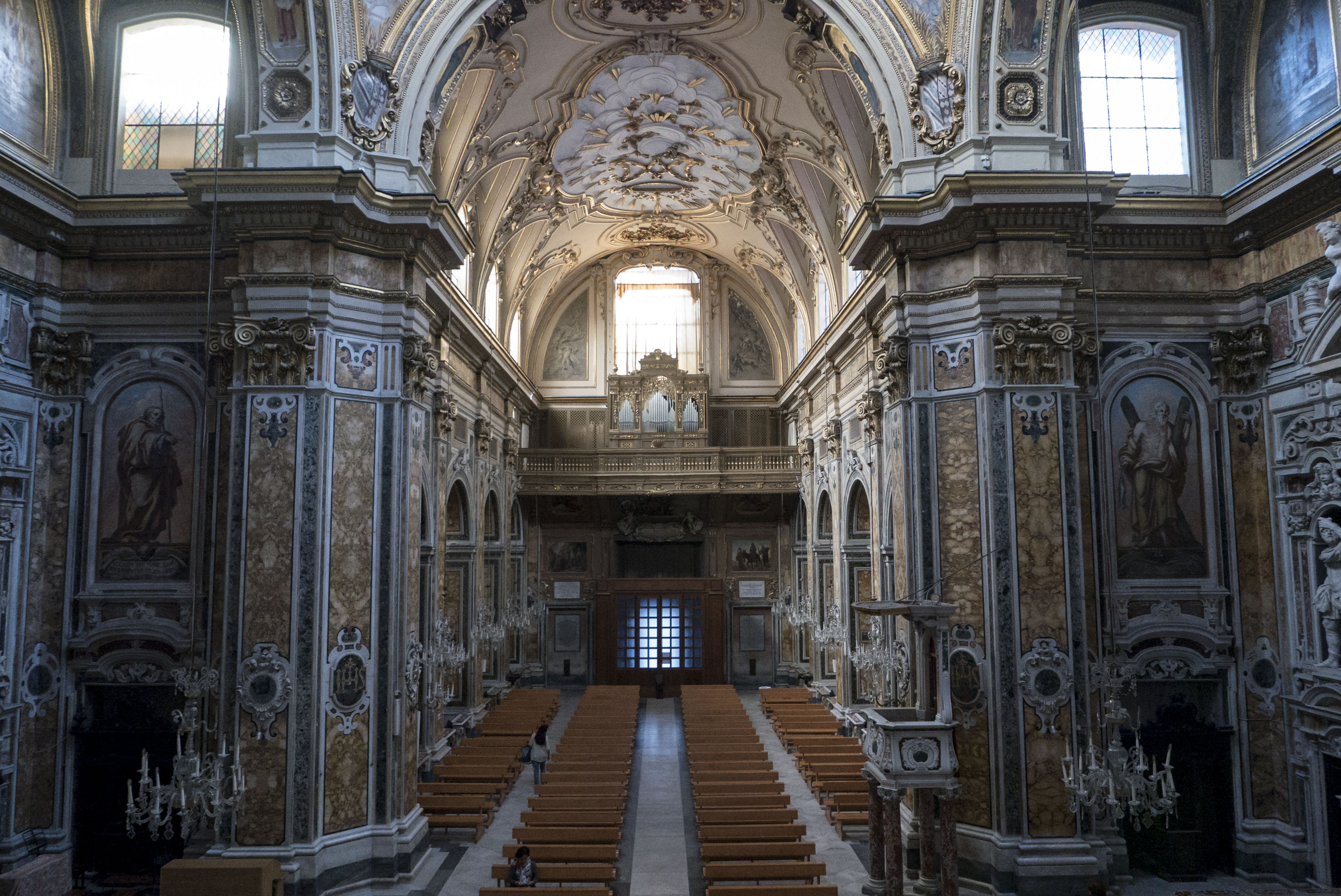 Basilica del Gesù Vecchio